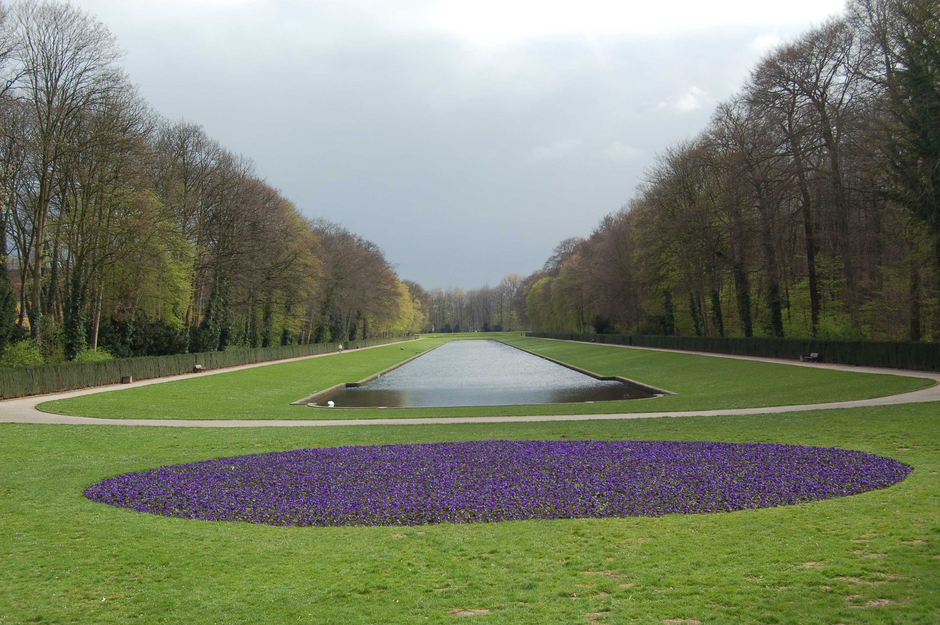 Nördlicher Teil des Benrather Schlossparks